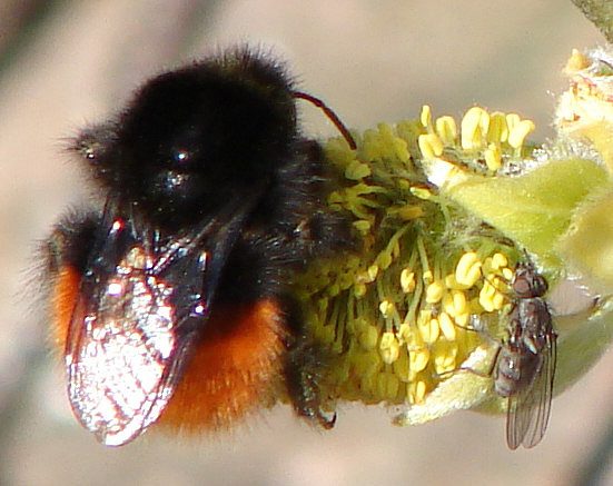 Bilberry bumblebee Norwegian: Bombus monticola er ei lita humle som er ofte å finne på blåbærlyng når denne blomstrer og i england kaller de den blåbærhumla.